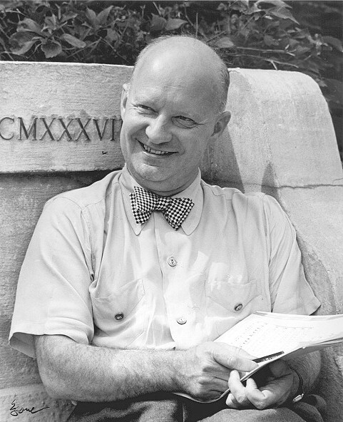 Paul Hindemith 1939/40 während seines Exils in den USA. (Paul Hindemith, 1895-1963, deutscher Komponist.